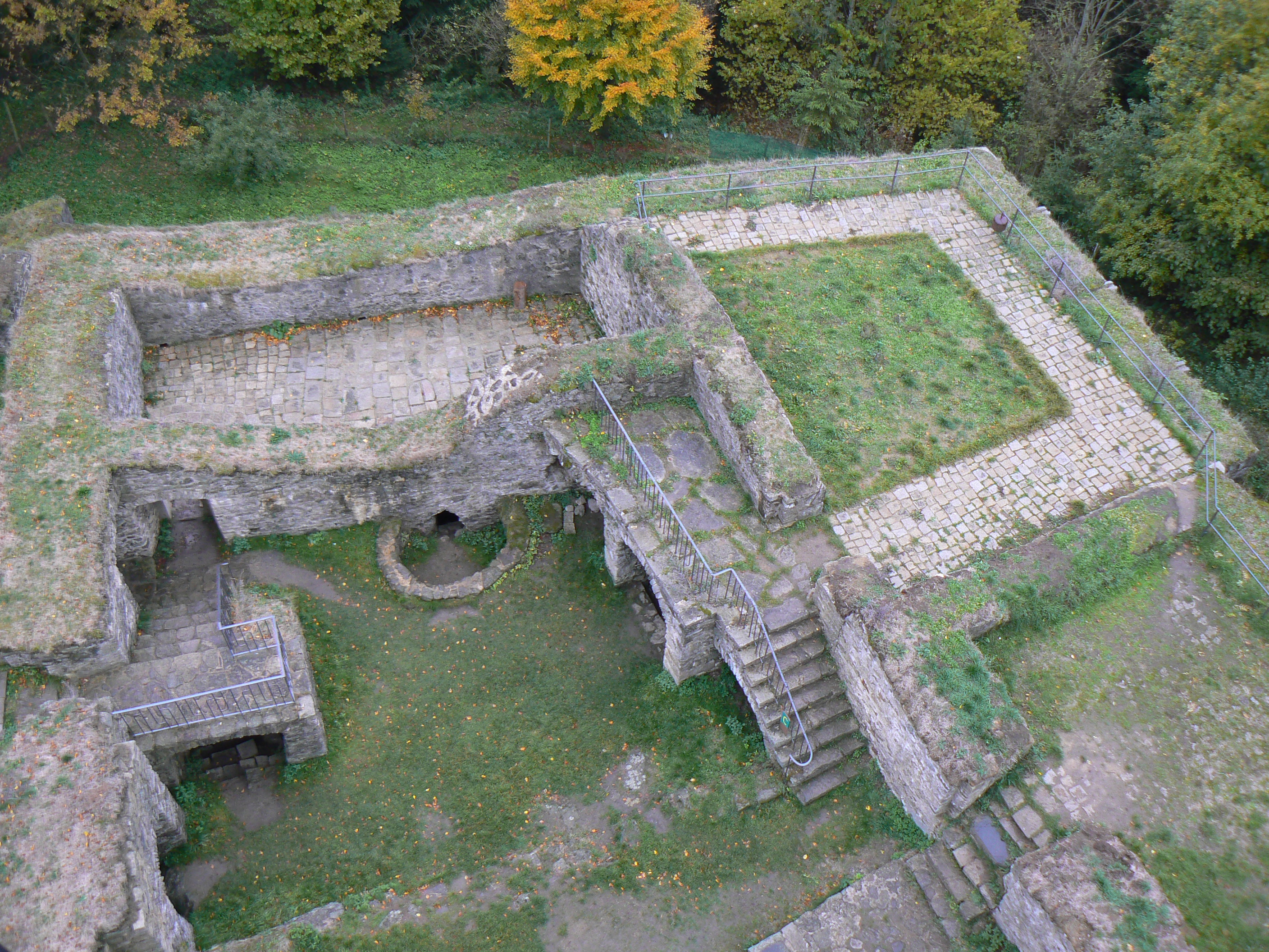 Orlík u Humpolce